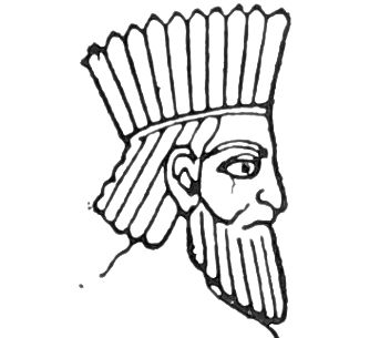 سر فرمانروای مادی اسیر از نقش بر جستهٔ سرپل‌ذهاب. هزارهٔ سوم پیش از میلاد